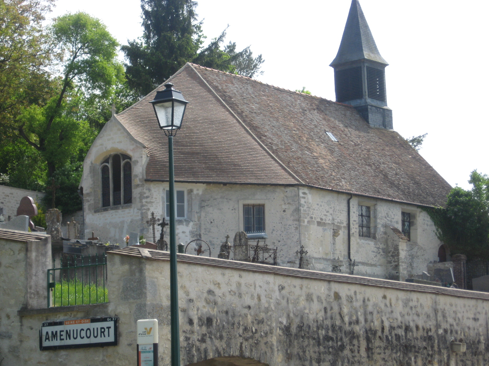 Commune d'Amenucourt (France)